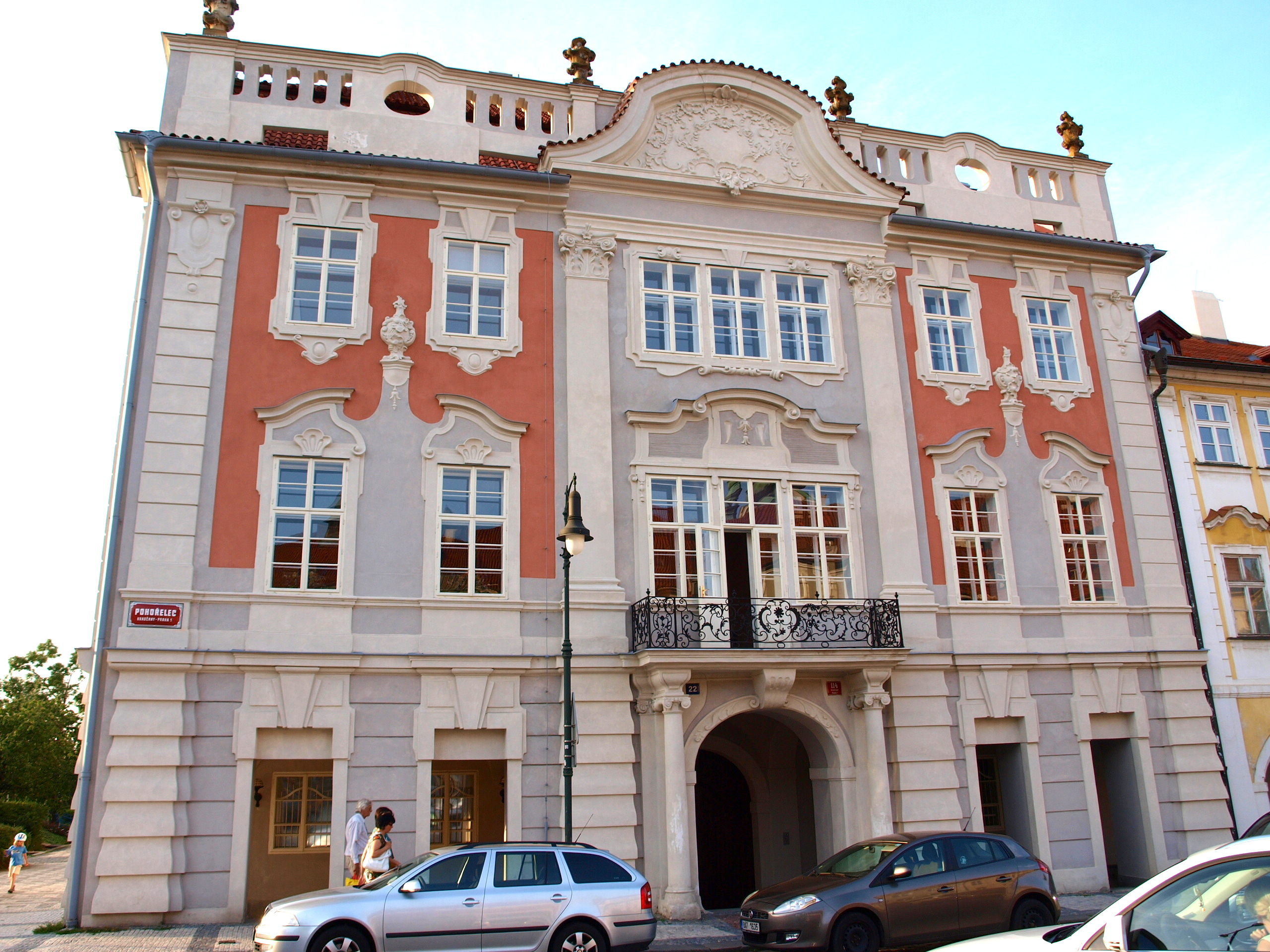 Kučerův palác